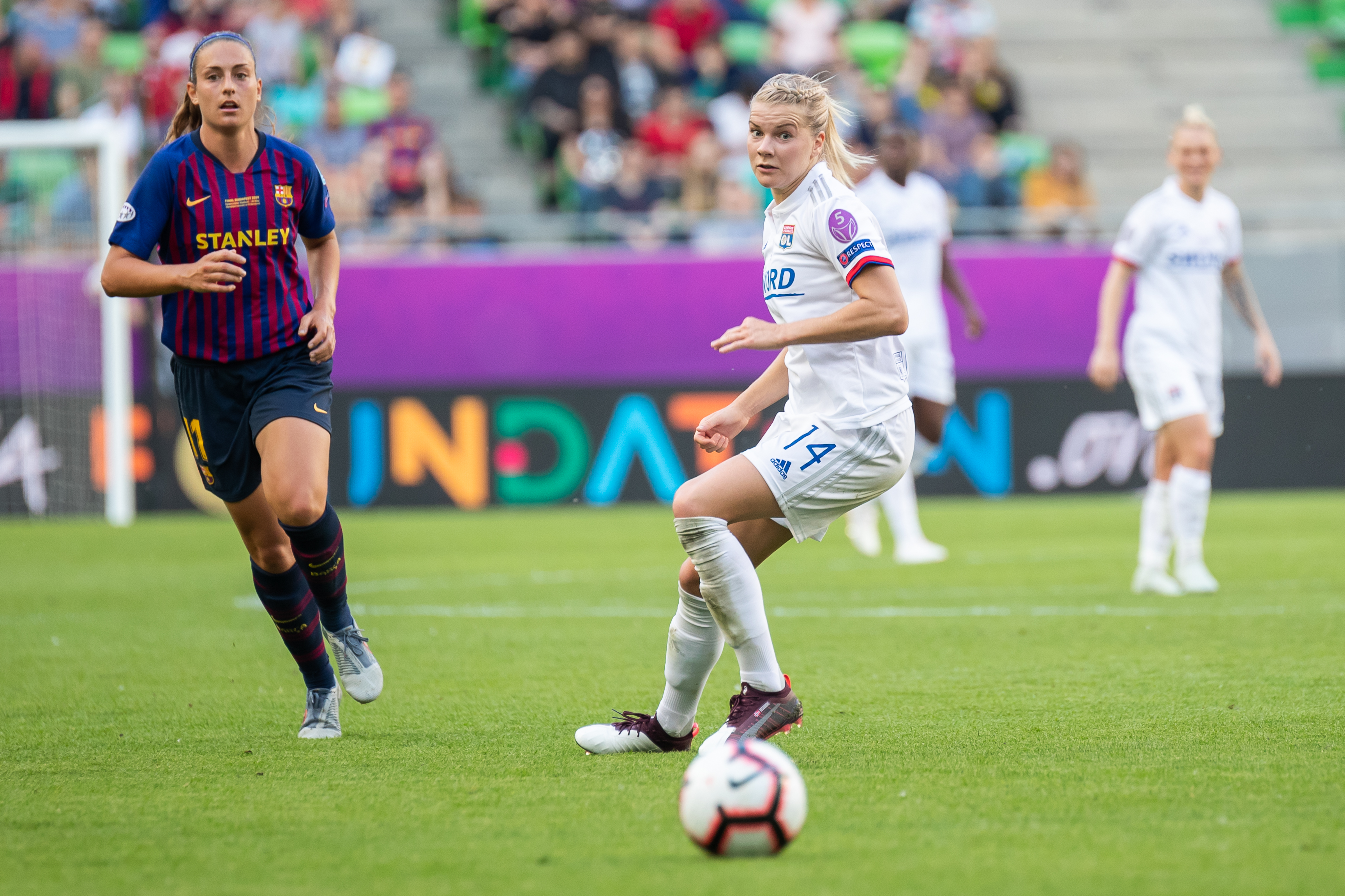 Fußball, Frauen, UEFA Women's Champions League, Olympique Lyonnais - FC Barcelona; v.li.: Alexia Putellas (FC Barcelona, 11), Ada Hegerberg (Olympique Lyon,14)